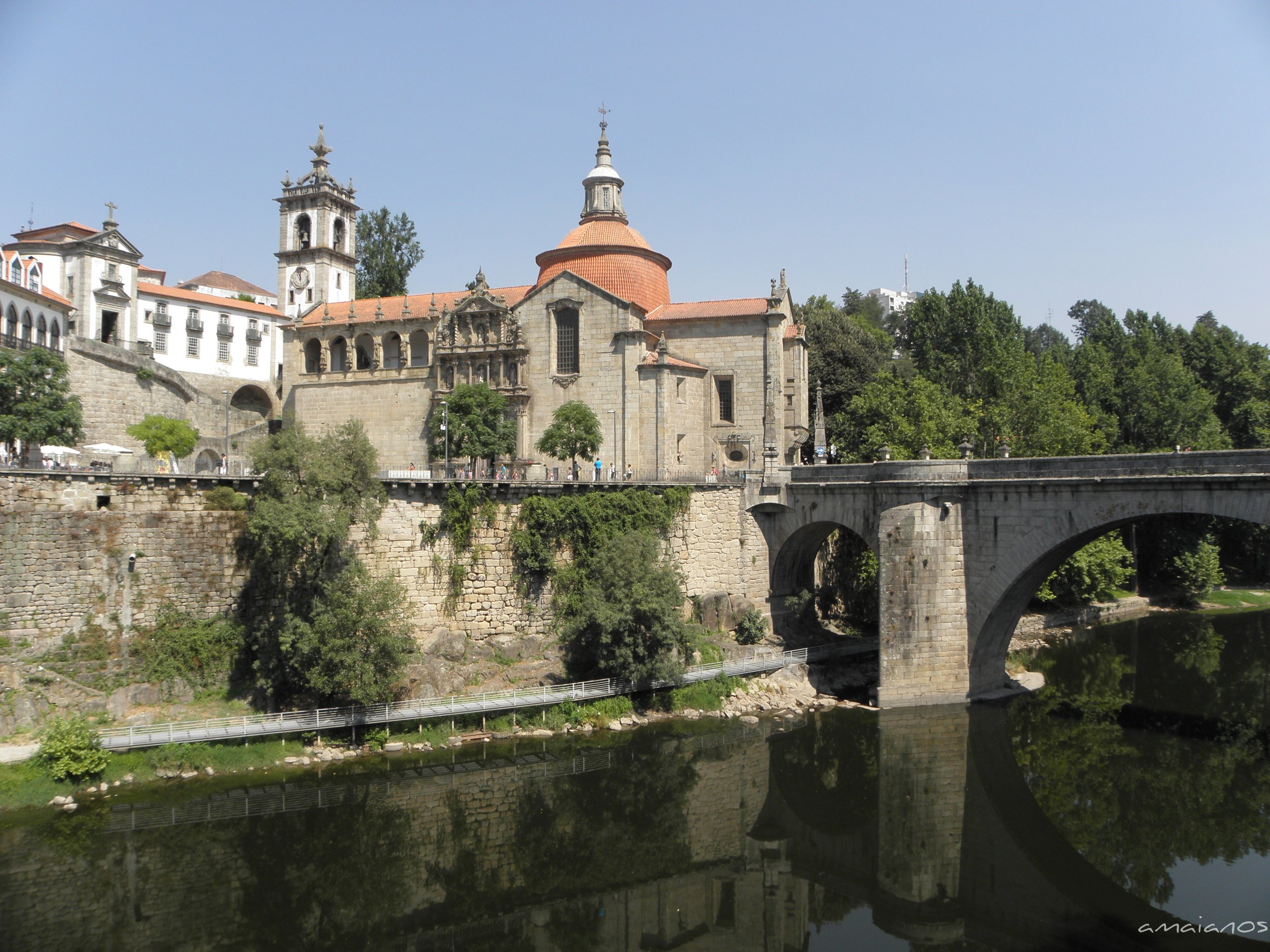 Amarante